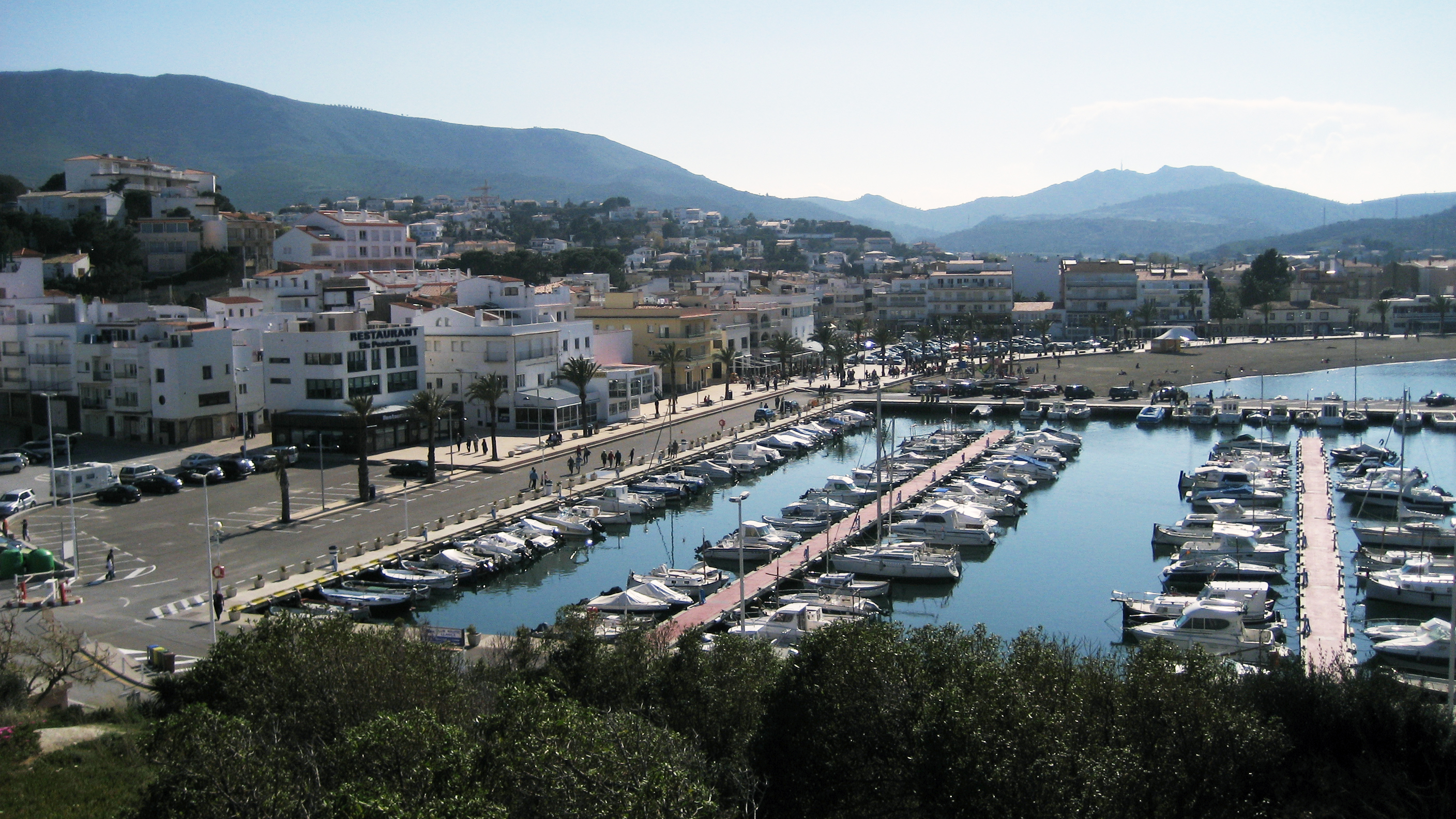 Vista del Port de Llançà vist des del Castellar (Alt Empordà, Girona)